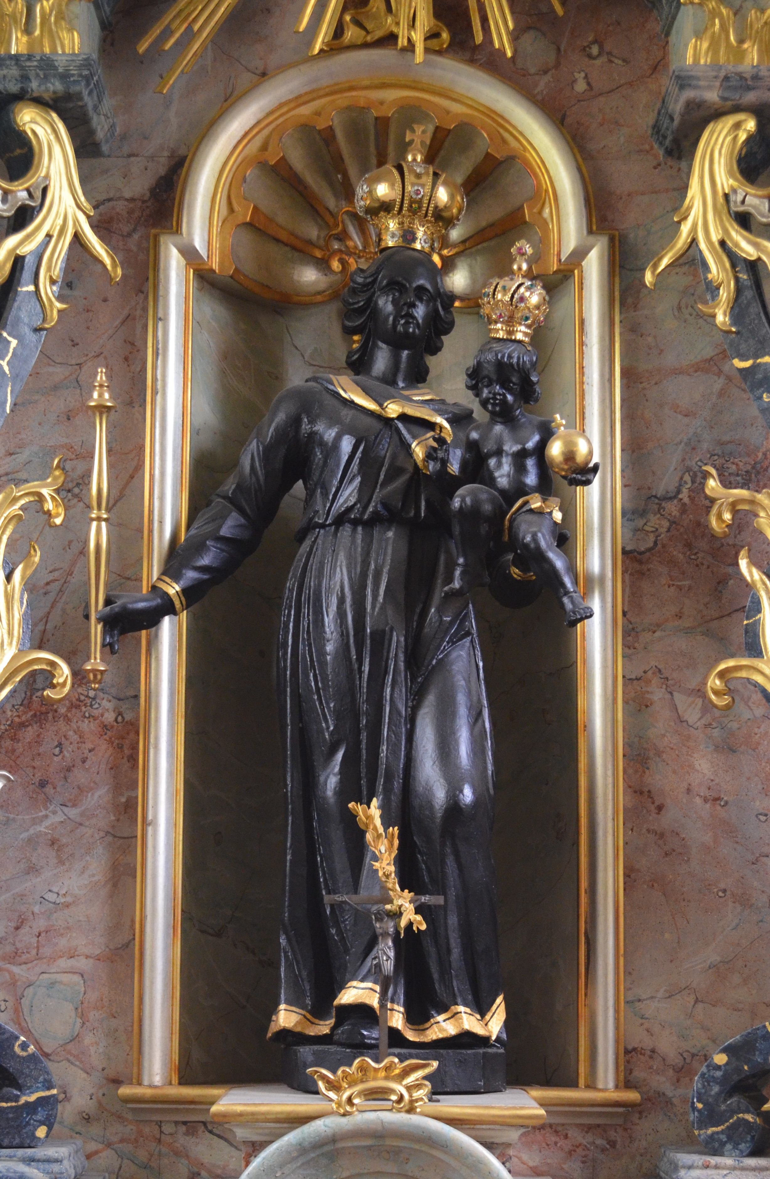 Genadebeeld van de Zwarte Madonna, Windhausen